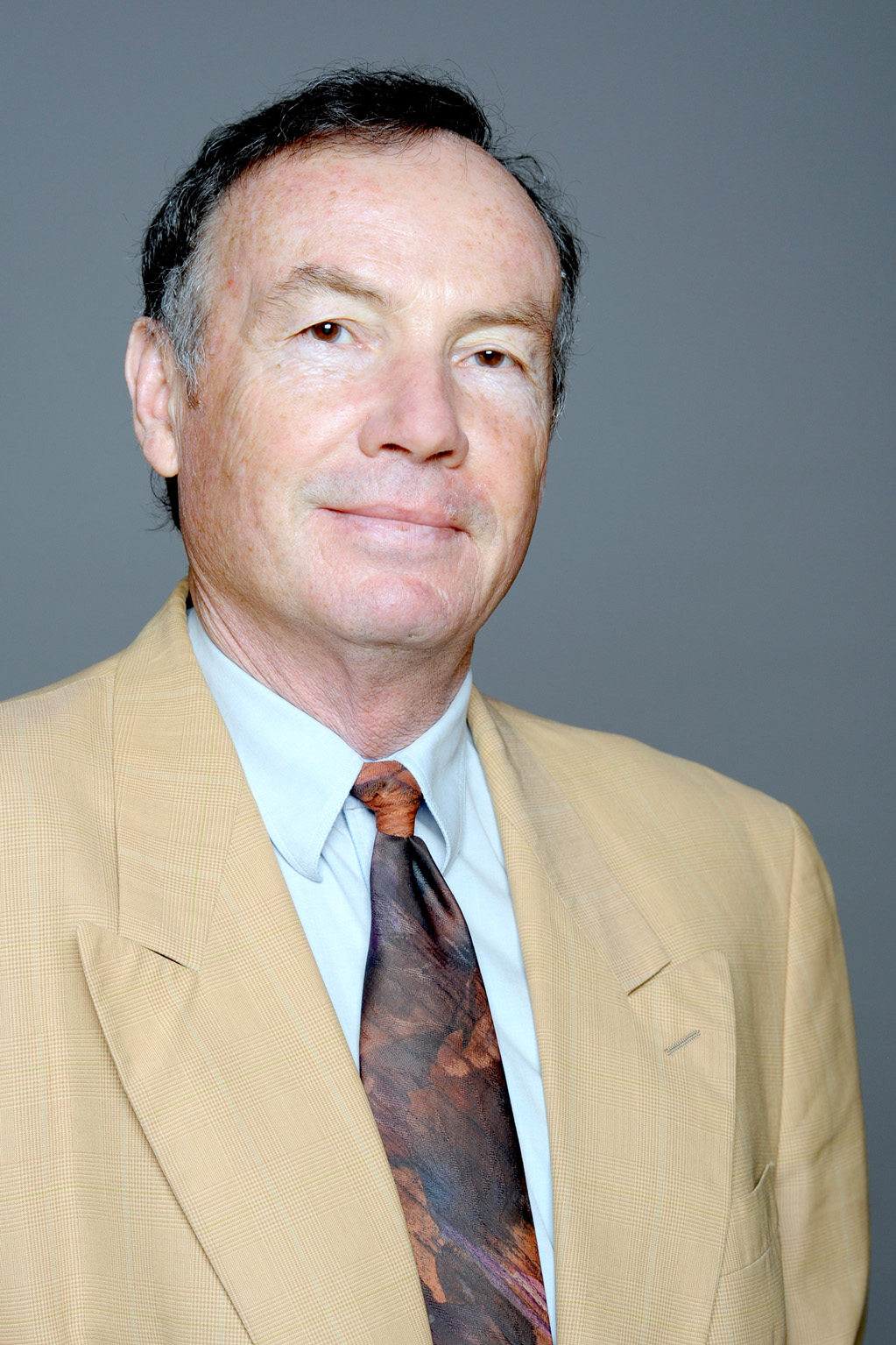 Michel Lesage, Député des Côtes d'Armor, Circonscription de Saint-Brieuc